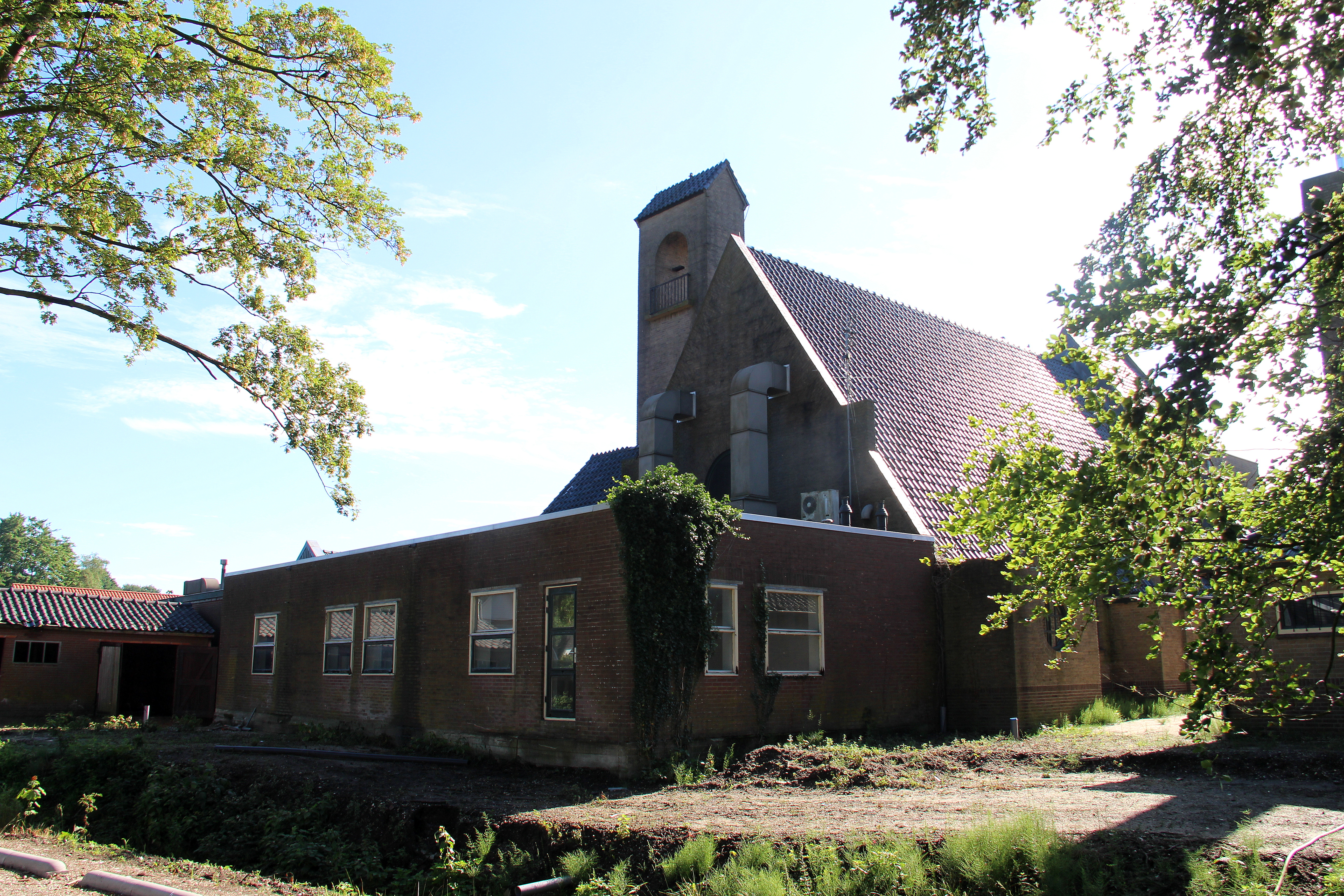 De plaats van de kerk is historisch. In 1711 is er een schuilkerk gebouwd. In 1858 kwam er een "echte" kerk. En in 1934 ontwierp Nic. Andriessen de huidige kerk, weer op diezelfde historische plaats. Bij de kerk waren een school en een pastorie. Dit gehele complex is in 1988 op de gemeentelijke monumentenlijst geplaatst. Na de bouw van de nieuwe RK Salvatorkerk werd de Willibrorduskerk verkocht. De kerk werd in 1971 fotostudio, later een reclamebedrijf. De kerk is weer verkocht.